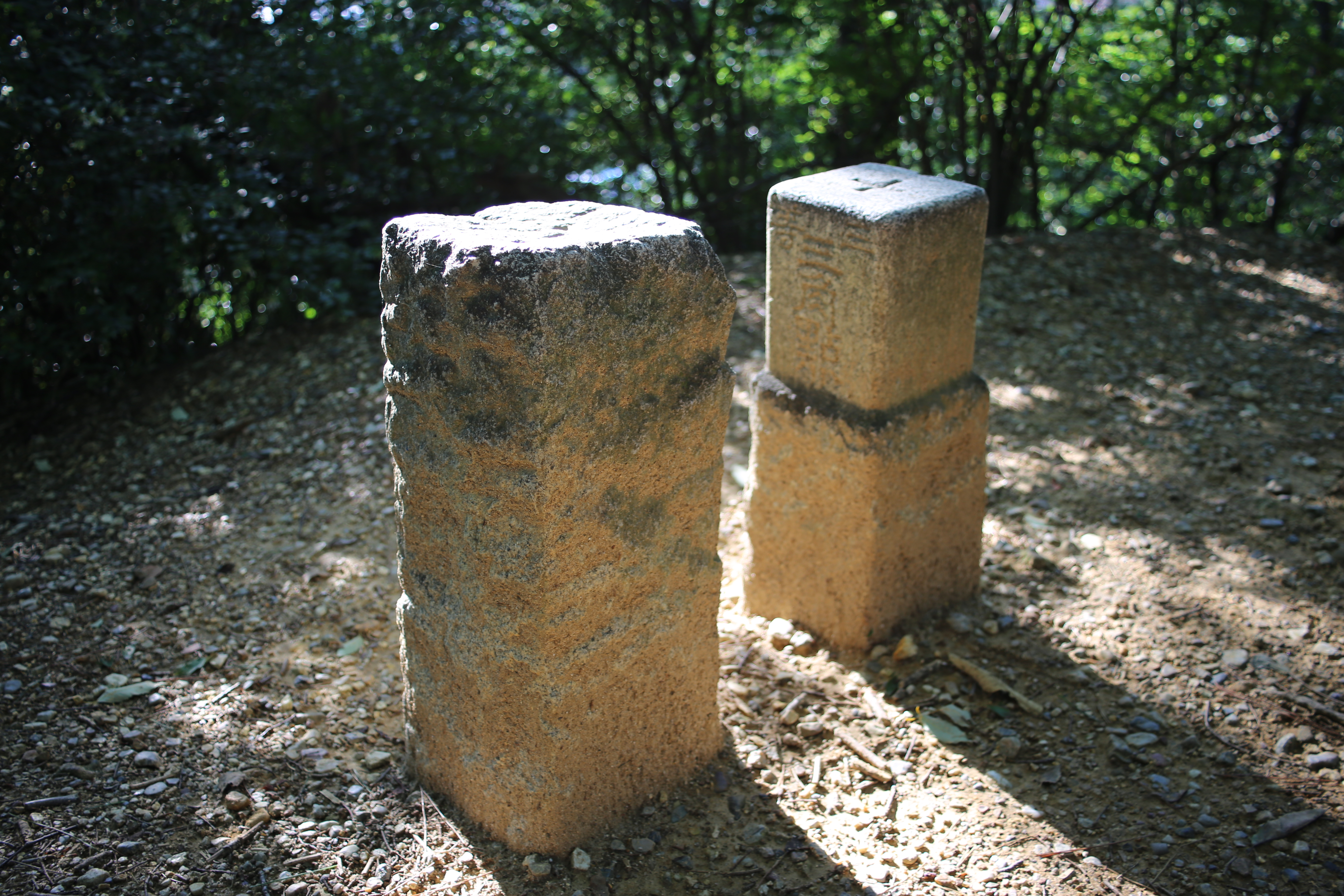 名古屋市名東区の明徳公園内 からす山頂上（三等三角点猪子石）付近の様子